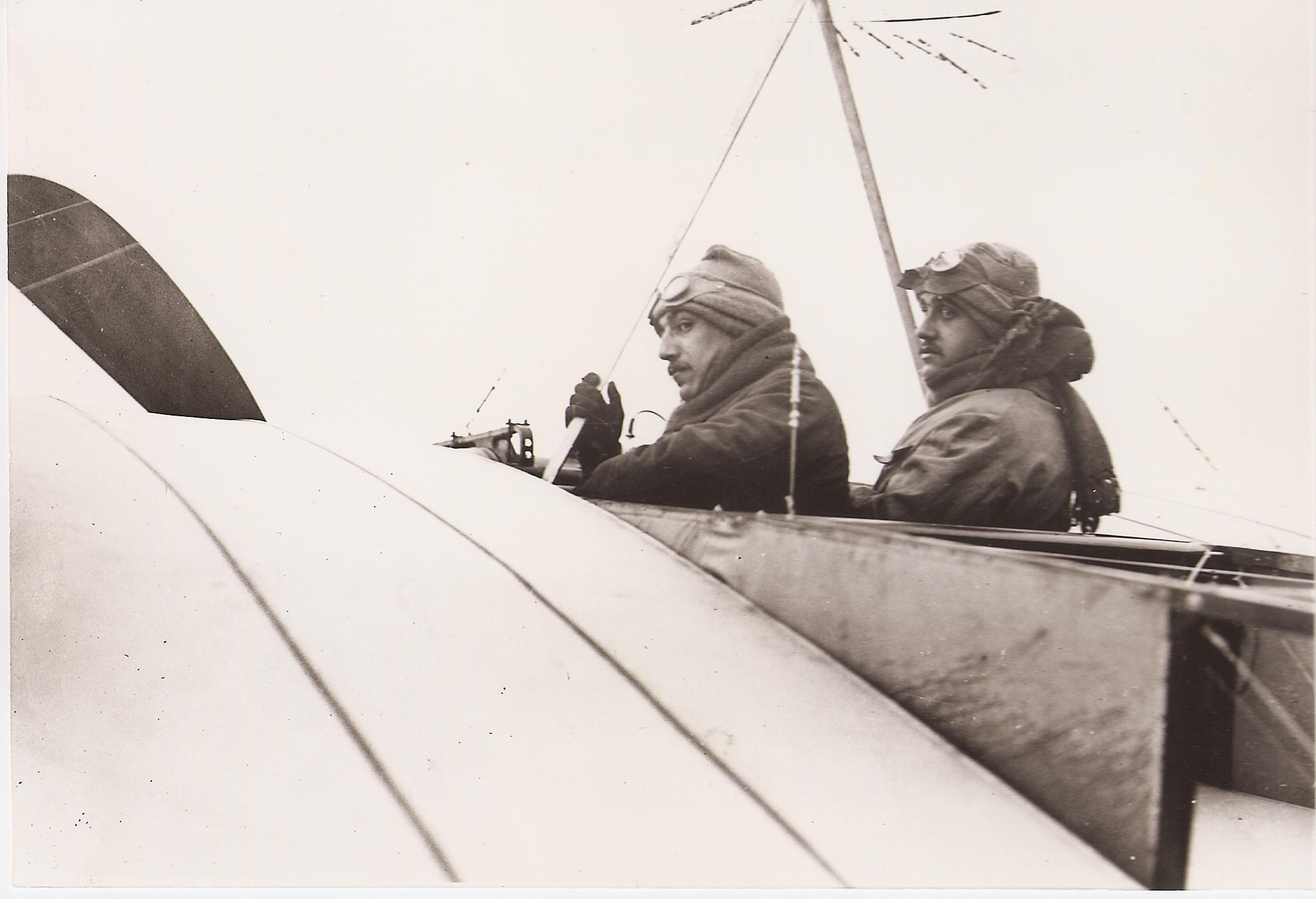 Leon et Robert Morane, tentative grand prix Michelin 1910